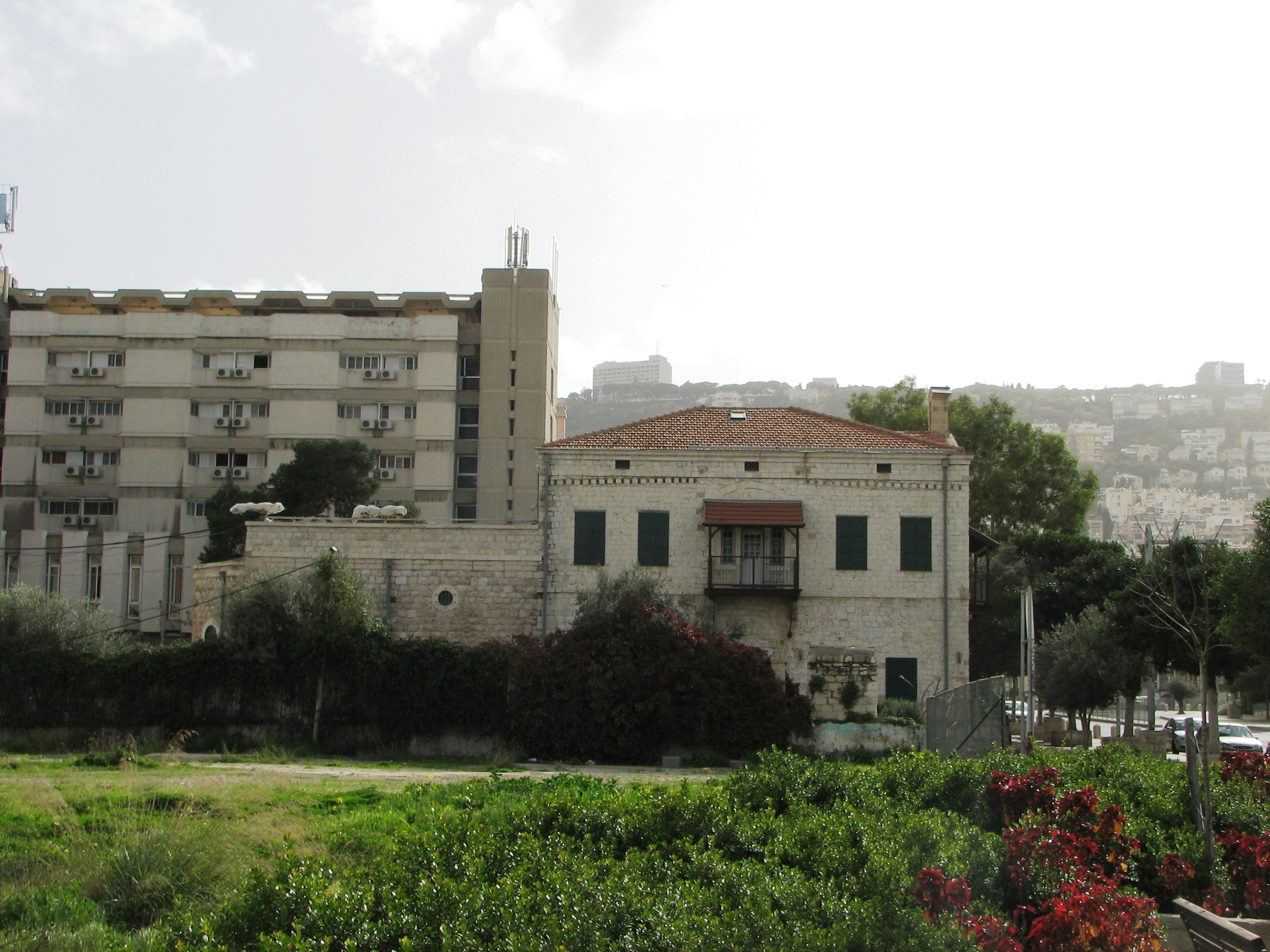 Community center in the german colony in Haifa/ Today Haifa City Museum בית העם במושבה הגרמנית בחיפה, המבנה משמש היום כמוזיאון העיר חיפה, שדרות בן גוריון 11, חיפה המבנה הראשי בשדרות ב גוריון